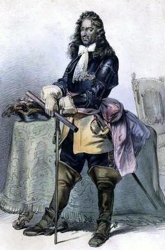 Ernst Graff Rüdiger von Starhemberg, Stadtkommandant in Wien. 1683